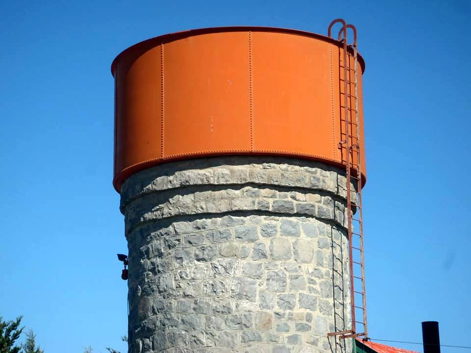 Tanque de agua para las locomotoras en perfectas condiciones